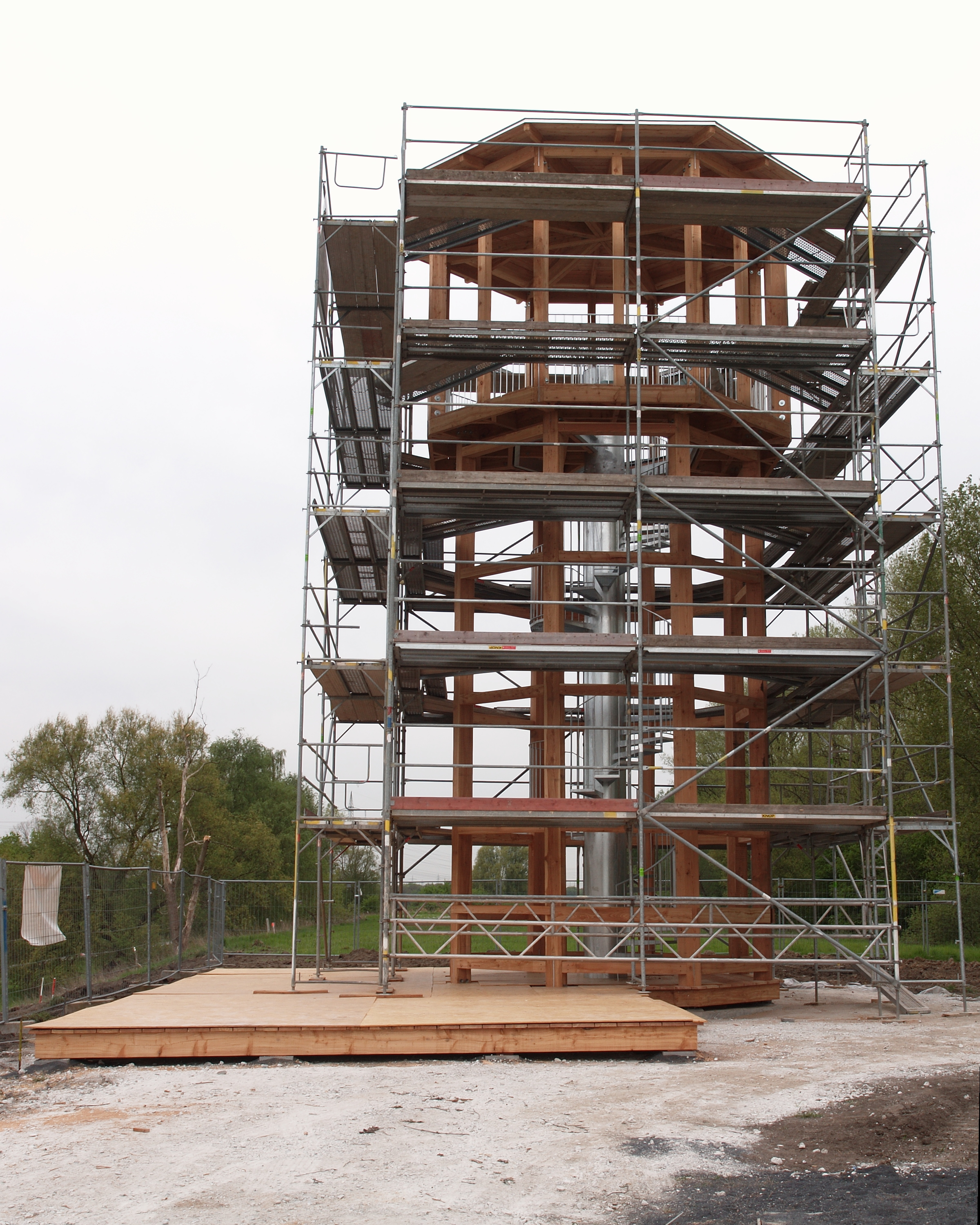 Skulptur Walkway and Tower von Tadashi Kawamata, im Bau. Die Skulptur wird im Rahmen des Projektes Emscherkunst.2010 errichtet.